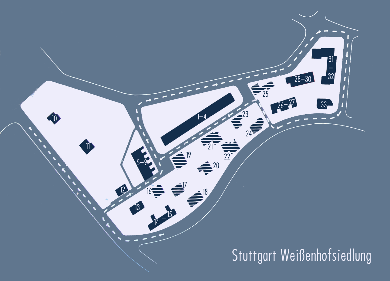 Plan der Weißenhofsiedlung in Stuttgart. Dunkelblaue Gebäude bestehen noch, schraffierte sind zerstört. Die Nummerierung folgt der der Webseite der Siedlung